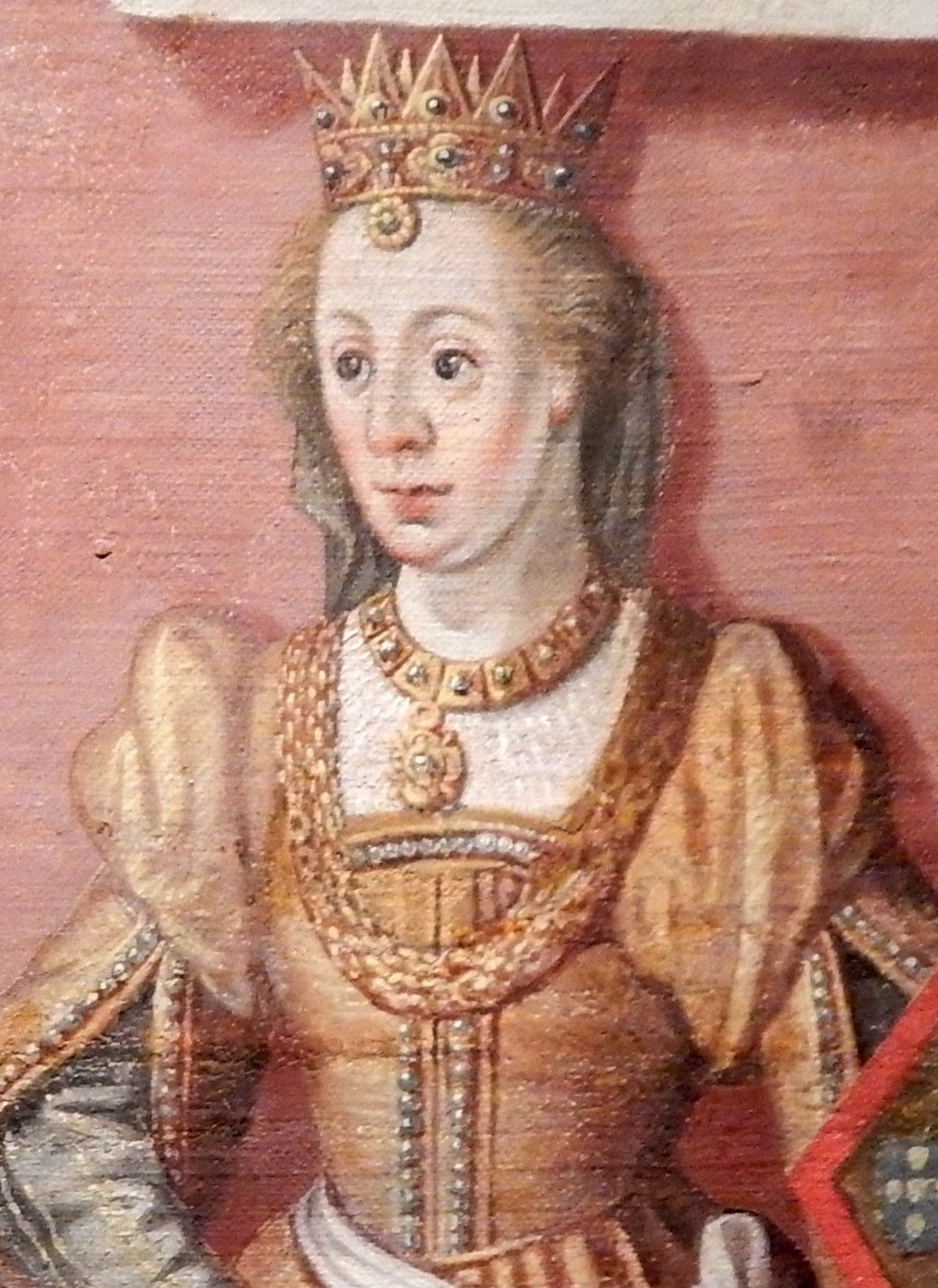 Philippa von England, Königin von Dacia (Dänemark-Schweden-Norwegen).